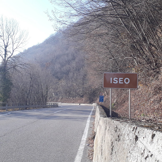 Cartello confine Iseo-Polaveno